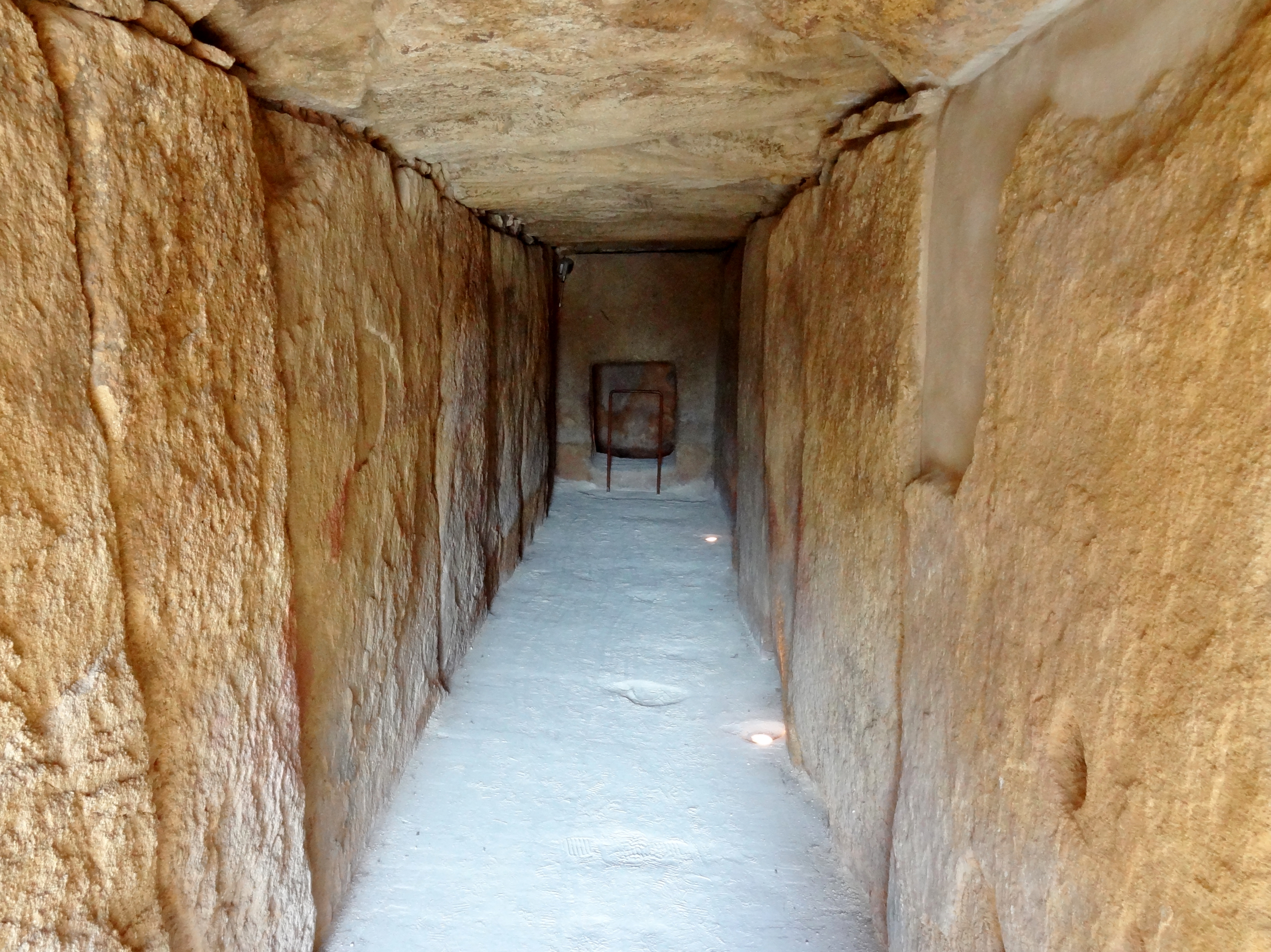 Dolmen de Viera in Antequera, Provinz Málaga, Spanien